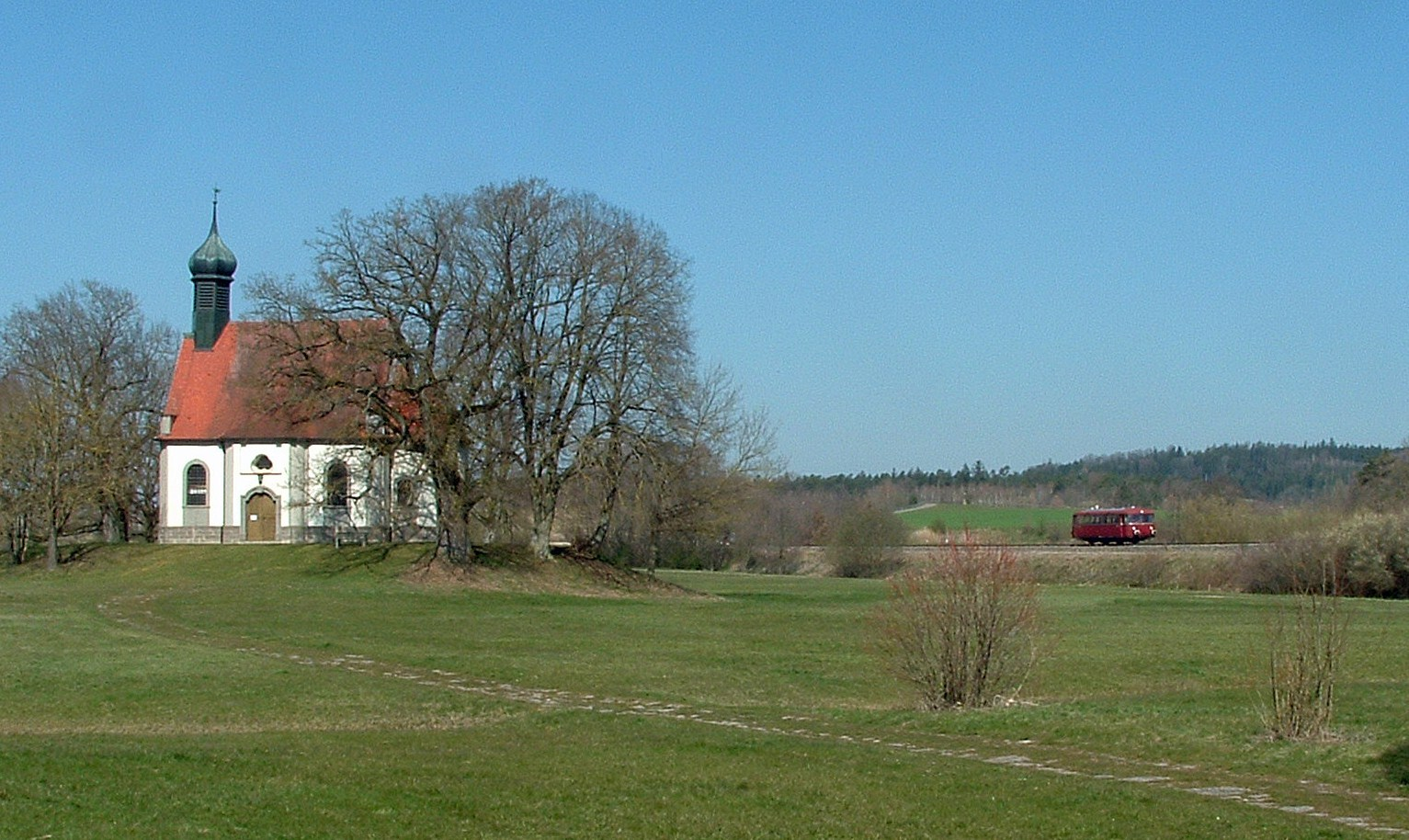 Heilig-Kreuz-Kapelle b. Wilburgstetten/Mfr. Rechts Testfahrt eines Schienenbus VT 98 auf der neu instandgesetzten Bahnline Nördlingen-Wilburgstetten am 07.04.2020